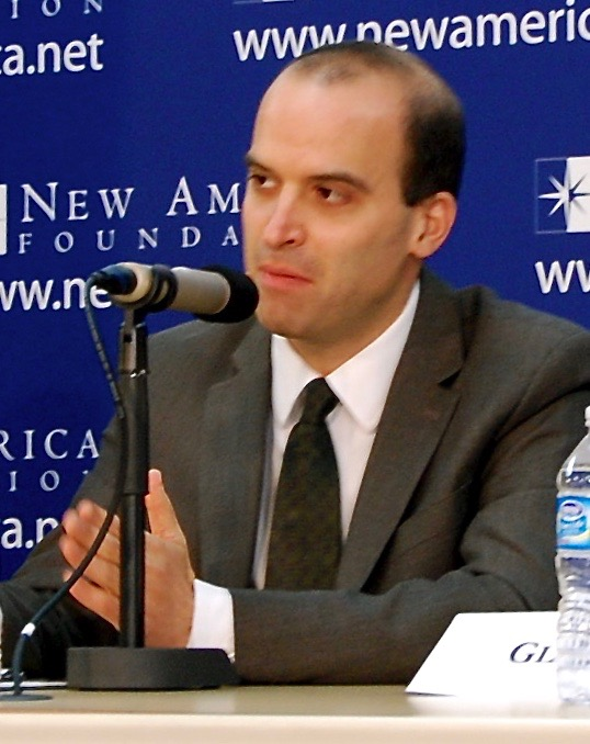 David Leonhardt